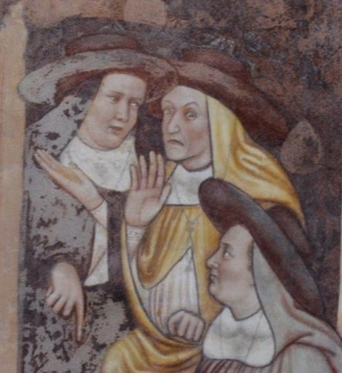 Tomaso da Modena - dettaglio